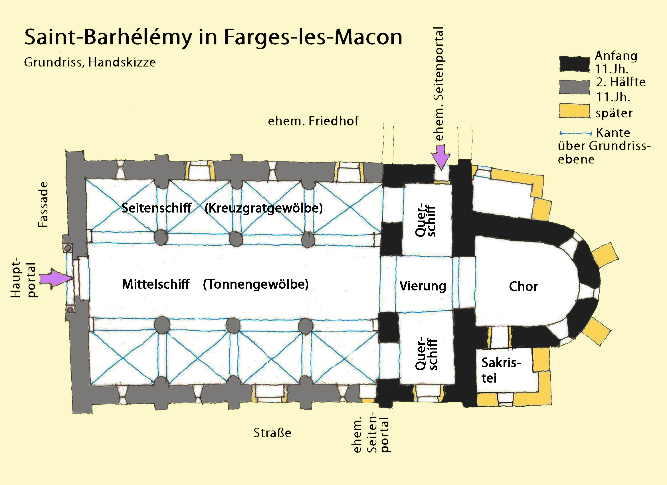 St-Barthélémy,_Farges,_Grundriss